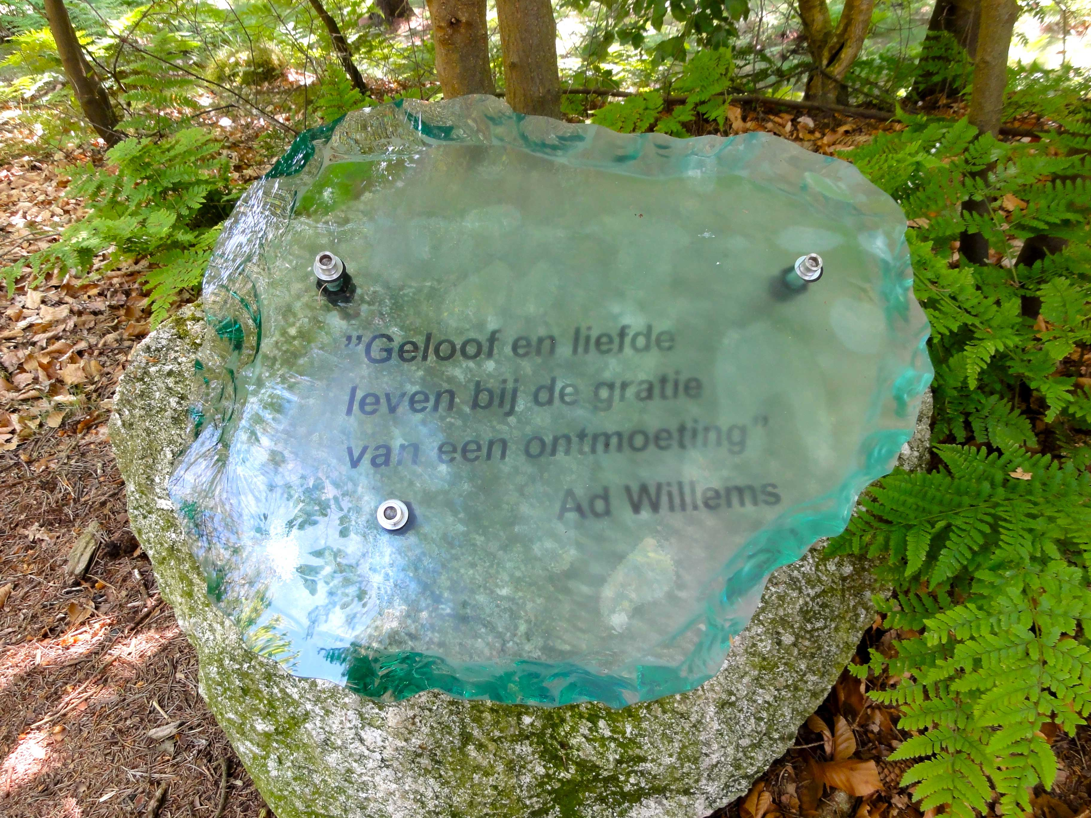 Deel van een zevendelig kunstwerk (Het Inspiratiepad) op het landgoed Fredeshiem